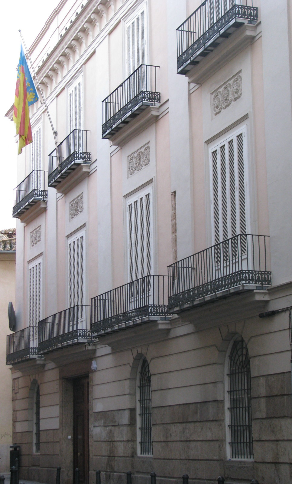 Palacio de los Barones de Alacuás. Actual sede de Lo Rat Penat. Fue residencia de los Trénor cuando se establecieron en Valencia.